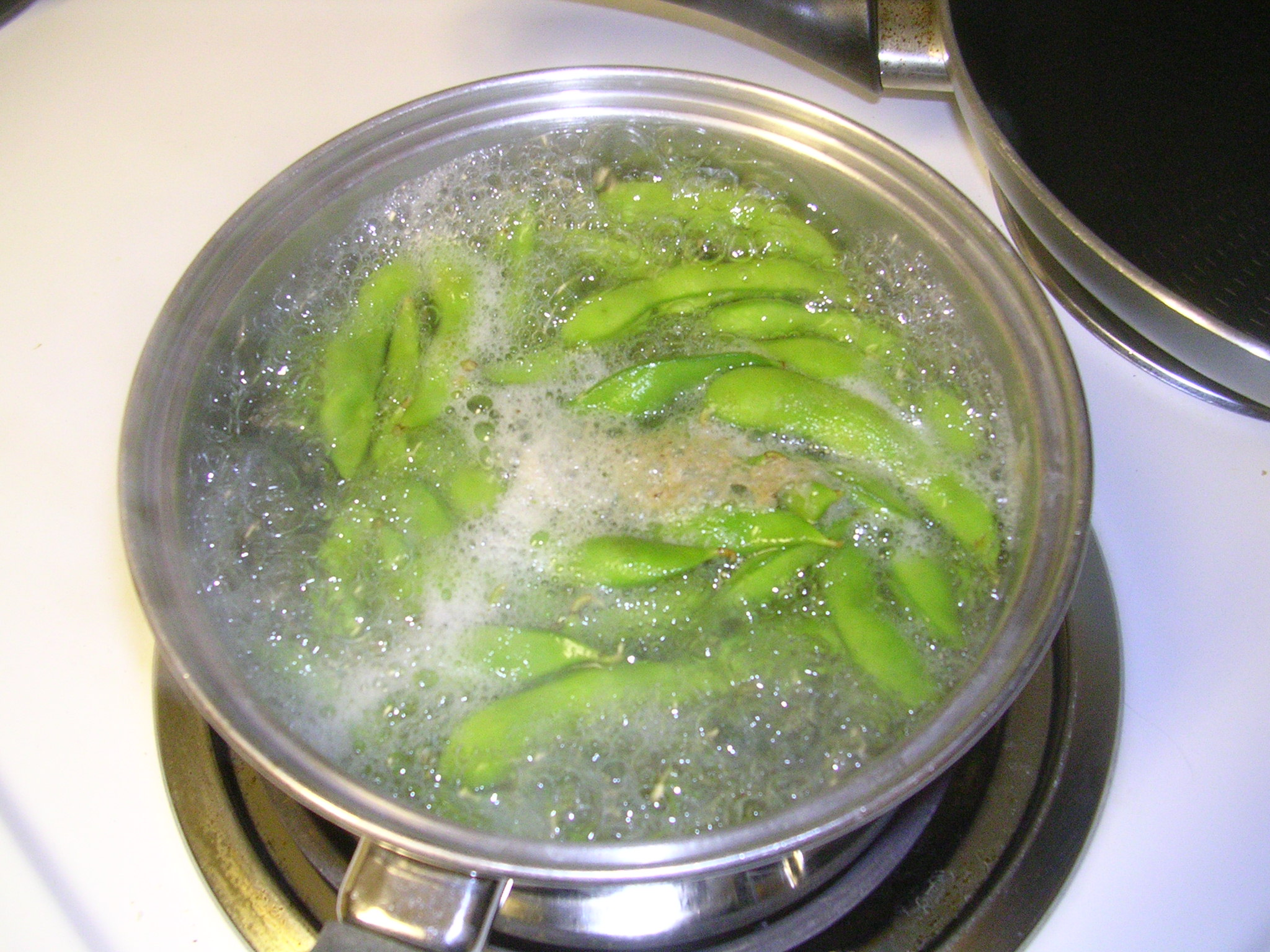 枝豆